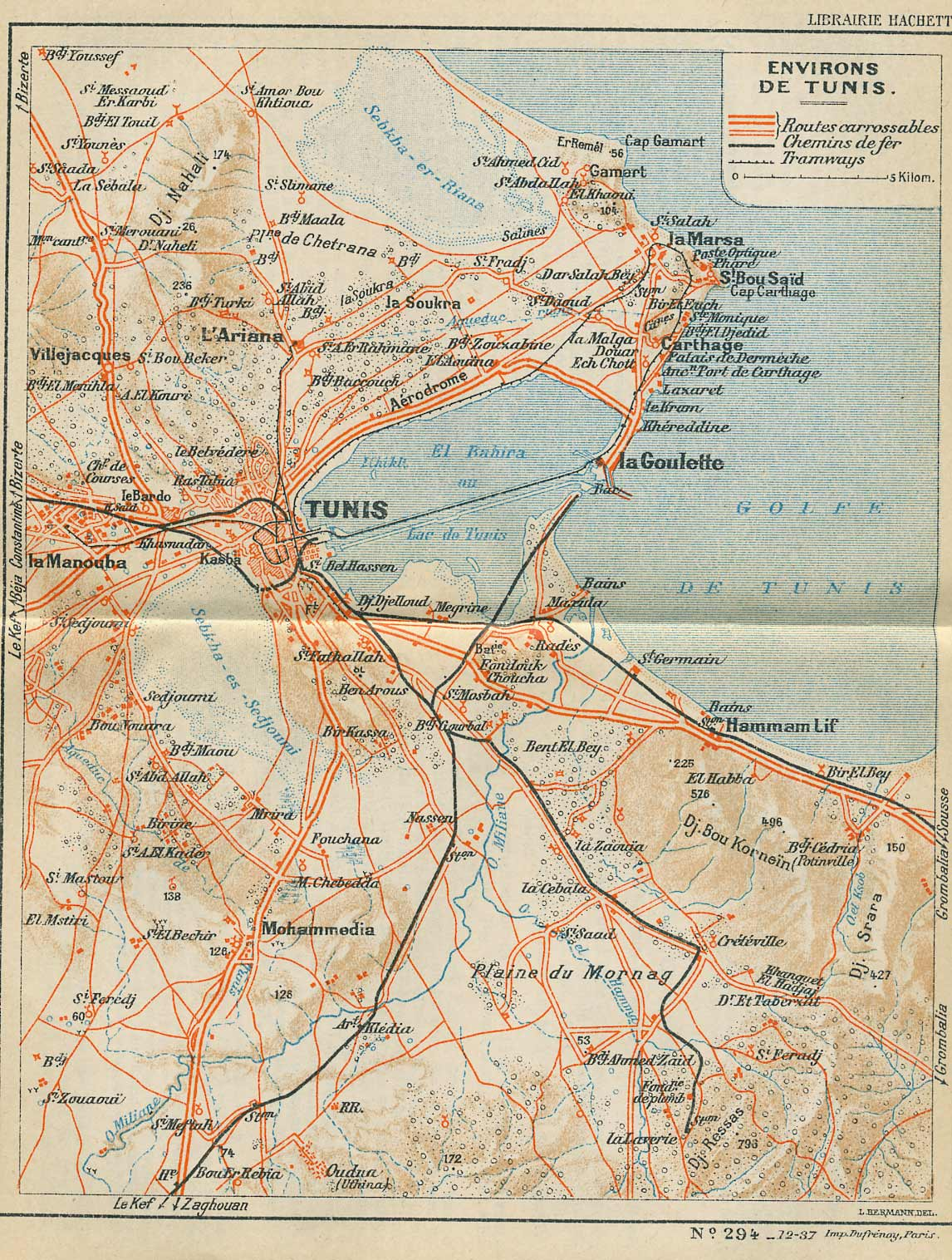 Plan de Tunis et ses environs en 1937, Tunisie